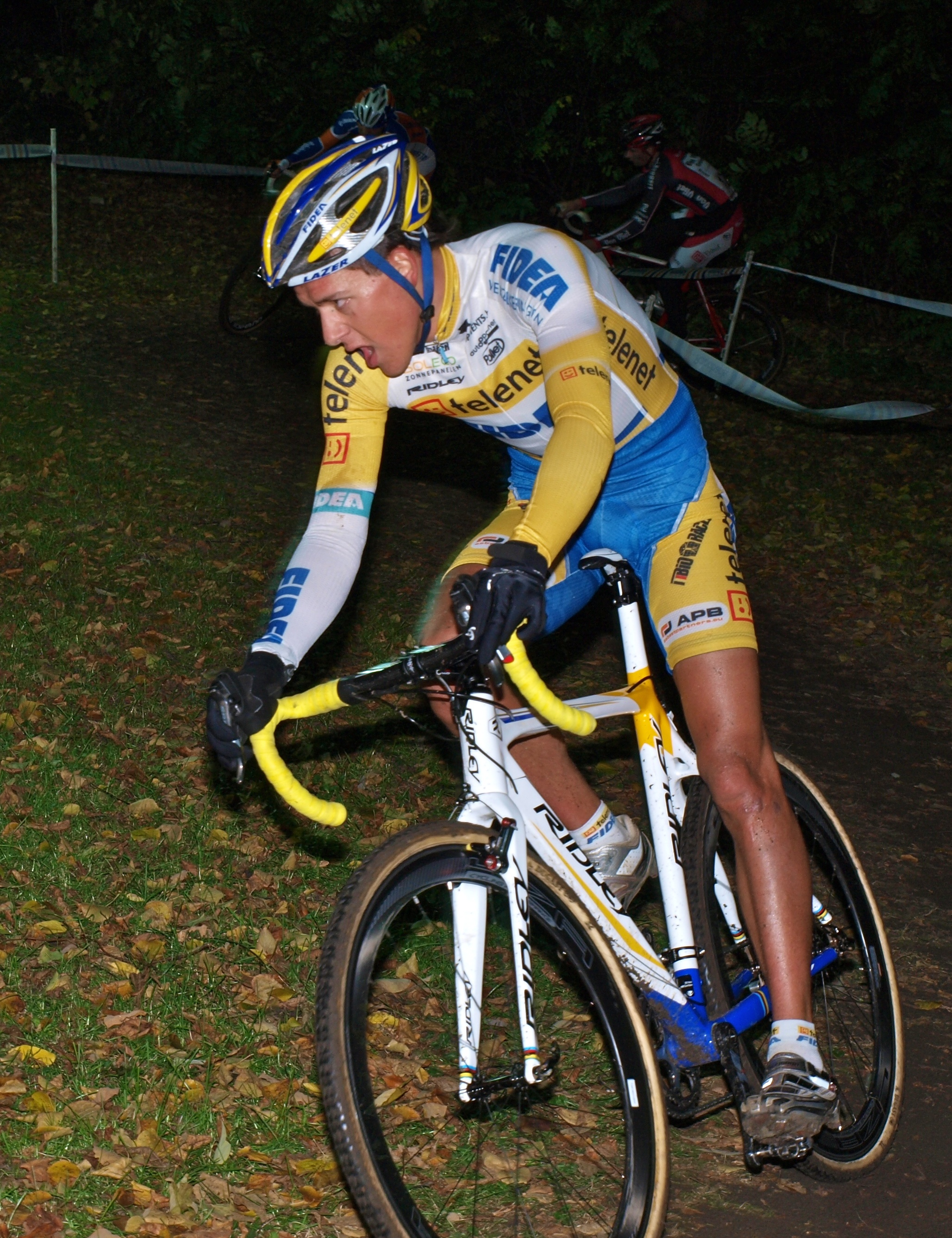 Veldrijder